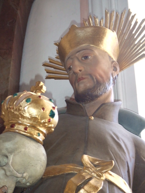 Filialkirche St. Leonhard, Heitlern, Gemeinde Pfronten, Landkreis Ostallgäu, Bayern Seitenaltar: Hl. Franz von Borgia